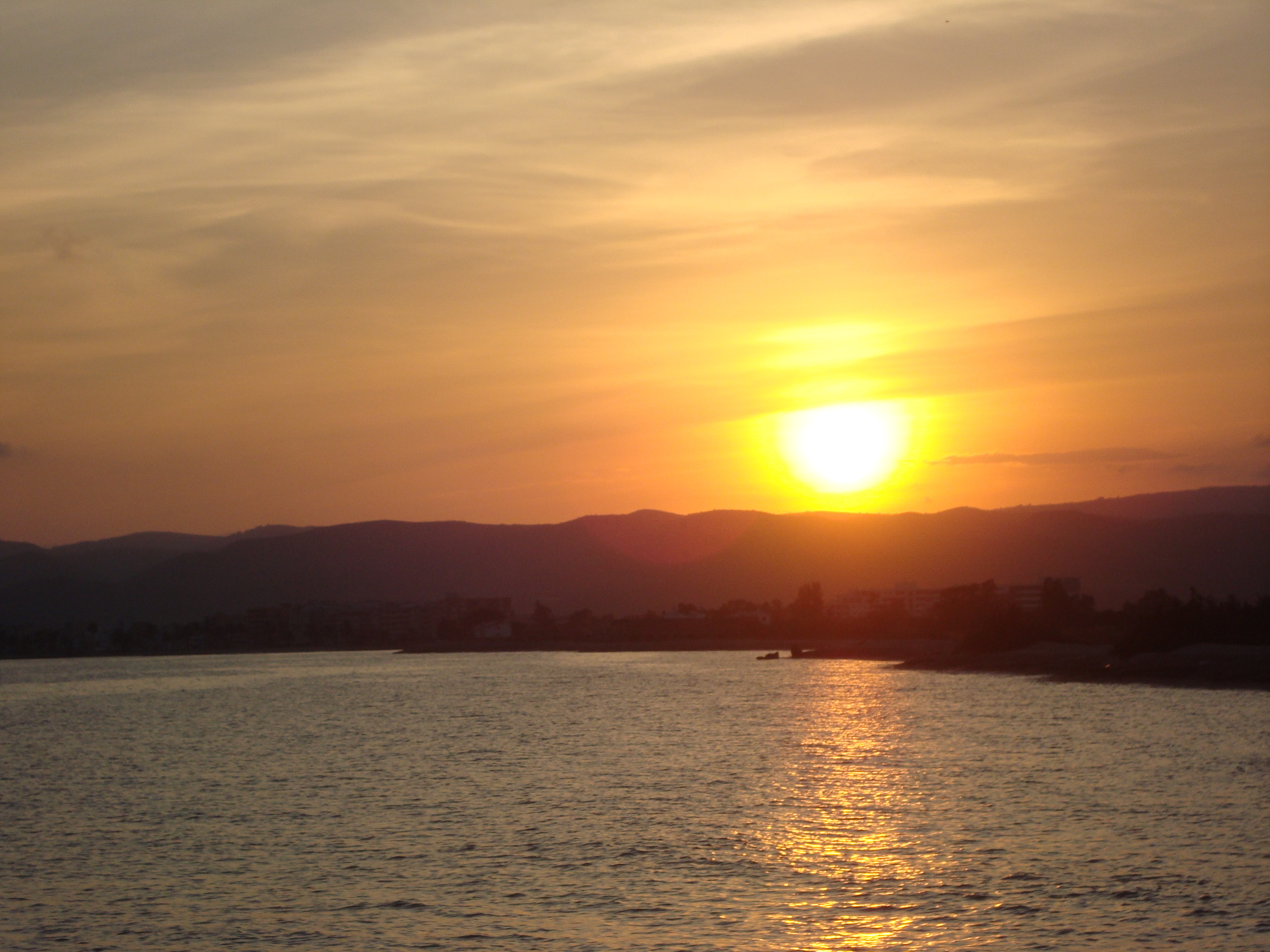 Capvespre al litoral i platges de Torreblanca-Torrenostra